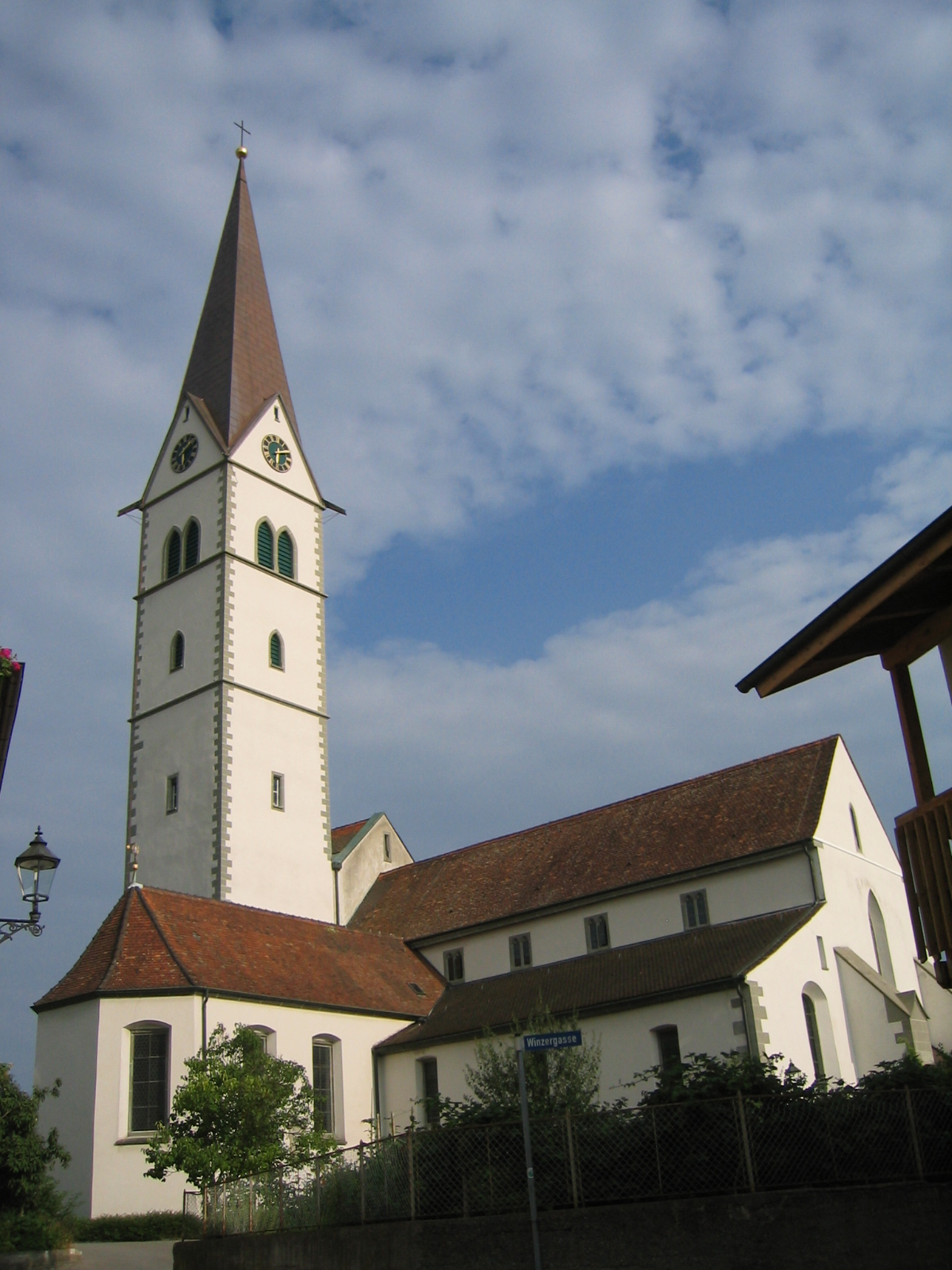 Markdorfer Kirche St. Nikolaus von NW nach Renovierung des Turms